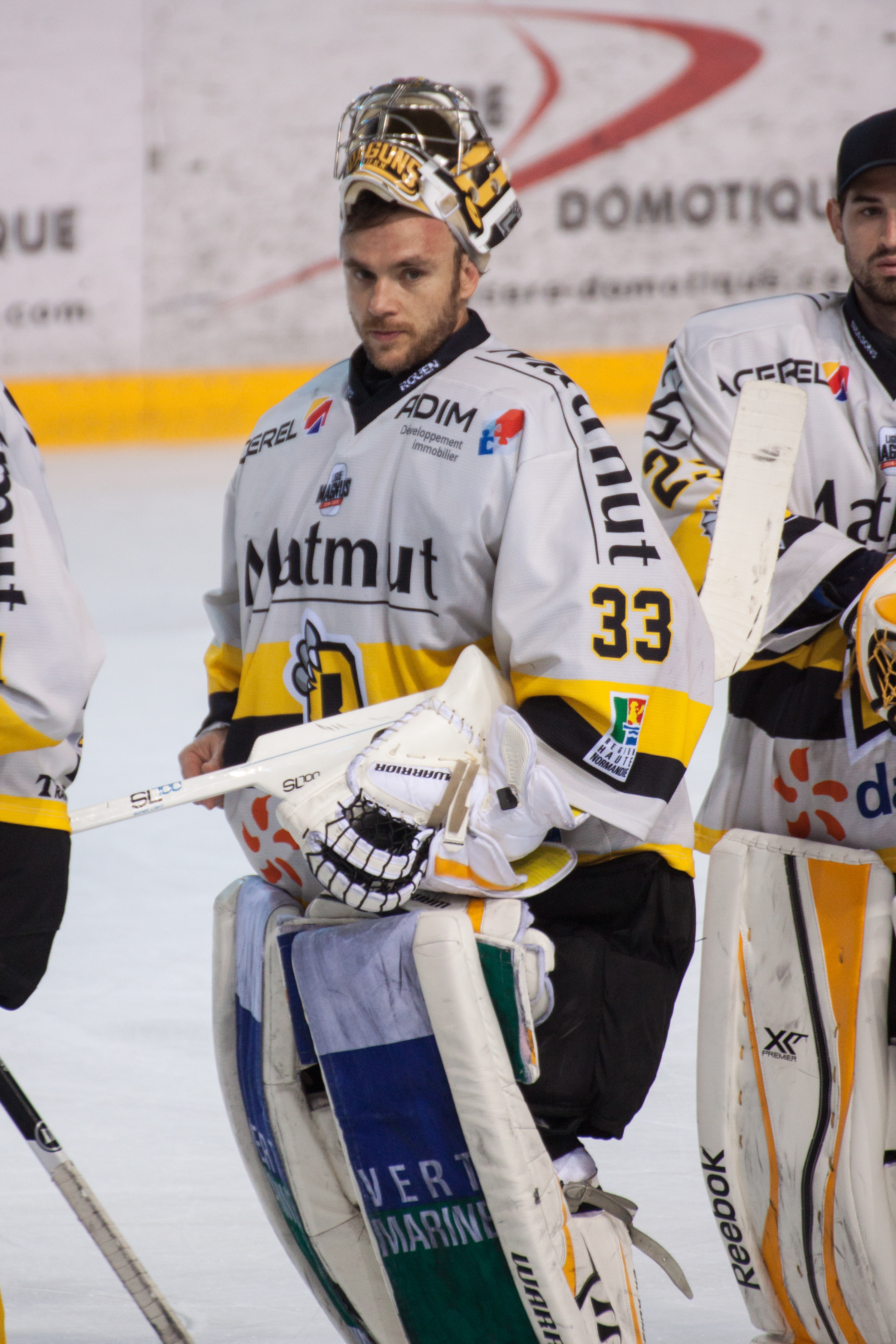 Fabrice Lhenry lors du match Grenoble-Rouen le 24 octobre 2014 à la patinoire Polesud.